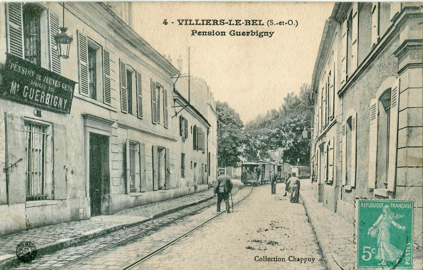 Carte postale ancienne éditée par Chappuy, n°4VILLIERS-LE-BEL - Pension GuerbignyUne rame du Tramway de Villiers-le-Bel s'éloigne.